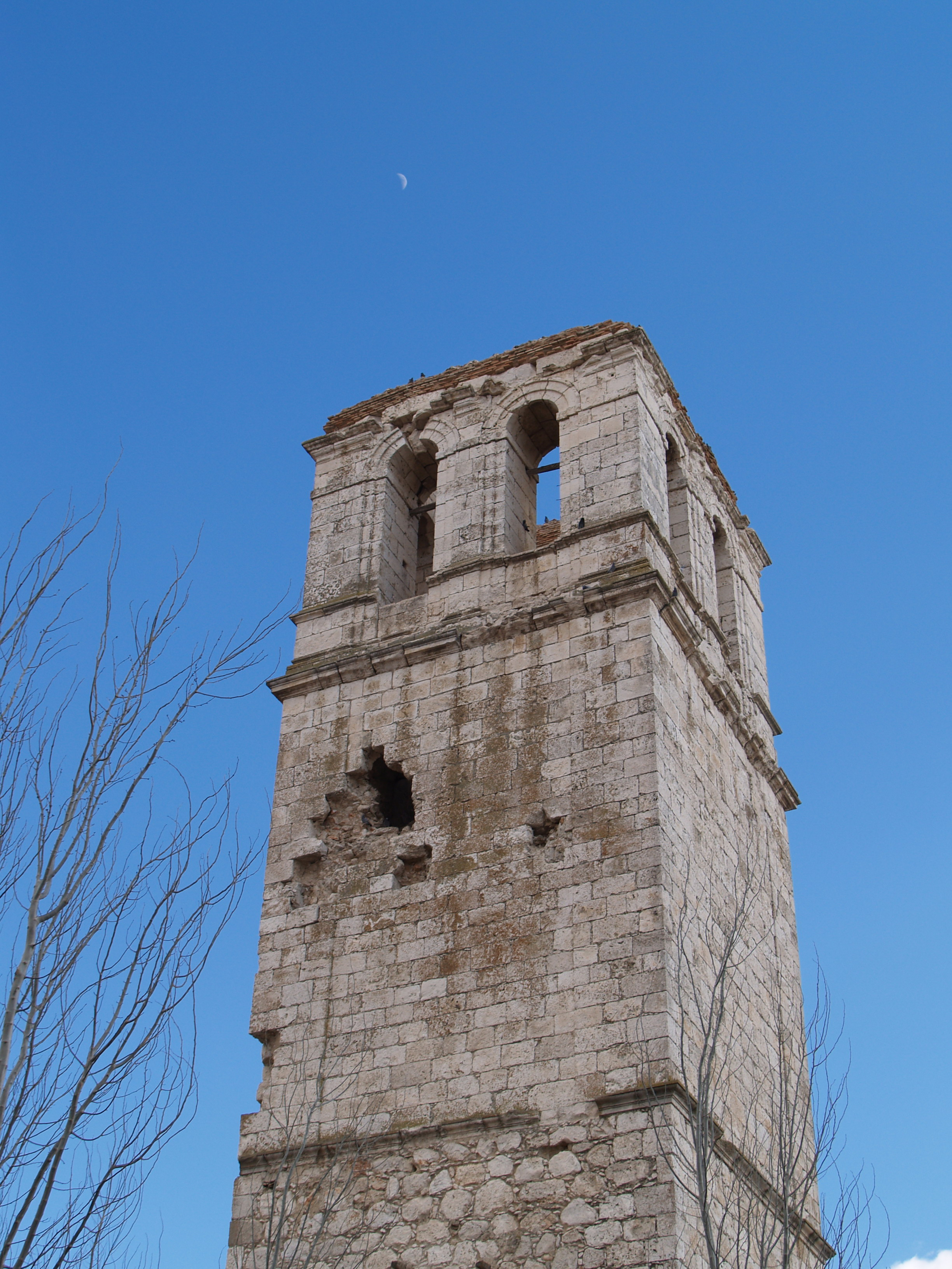 Hiszpania, Kastylia-La Mancha, Toledo, Stół Okani (Mesa de Ocańa), Ocańa, Kościół Świętego Marcina